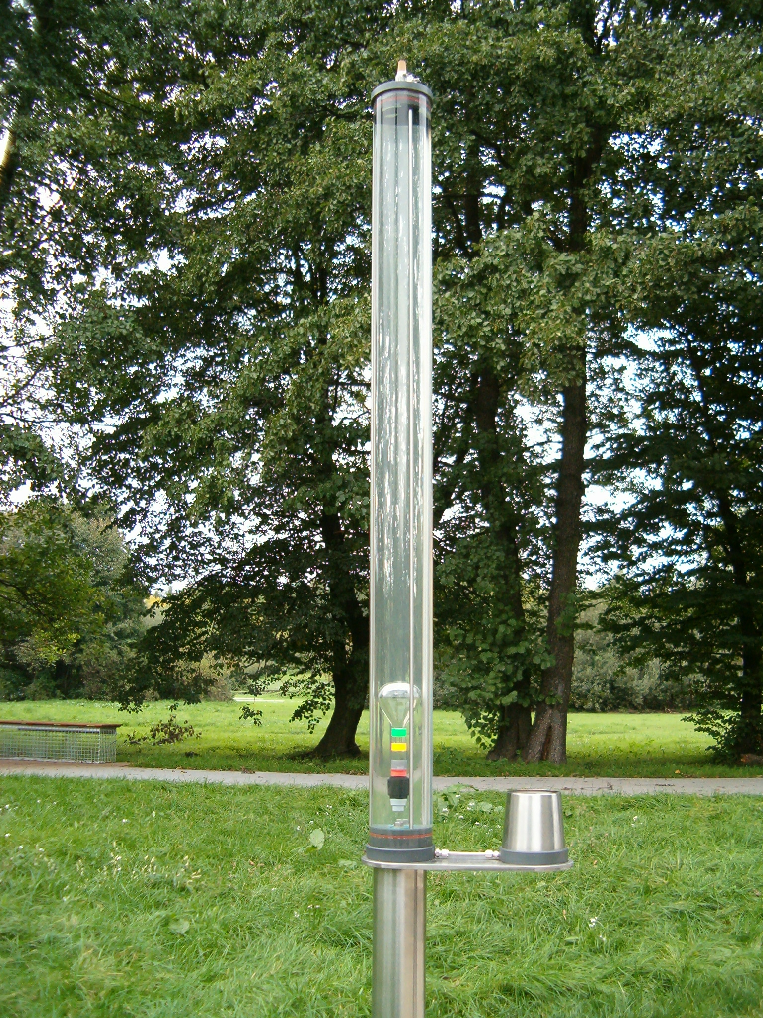 Ogród Doświadczeń w Krakowie - nurek kartezjański.